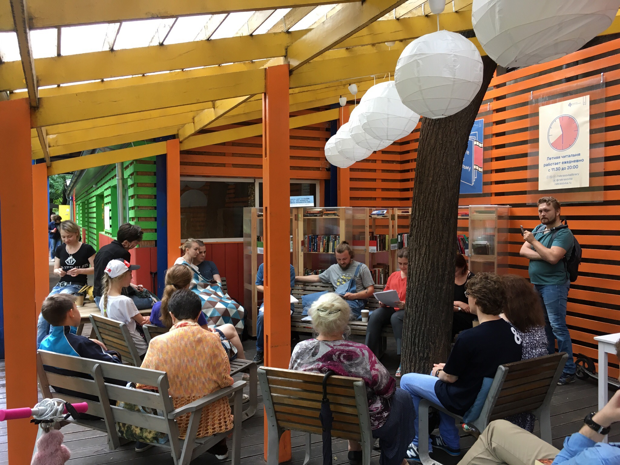 Летняя читальня Центральной библиотеке им.Н.А. Некрасова в Саду Баумана. 2018 год